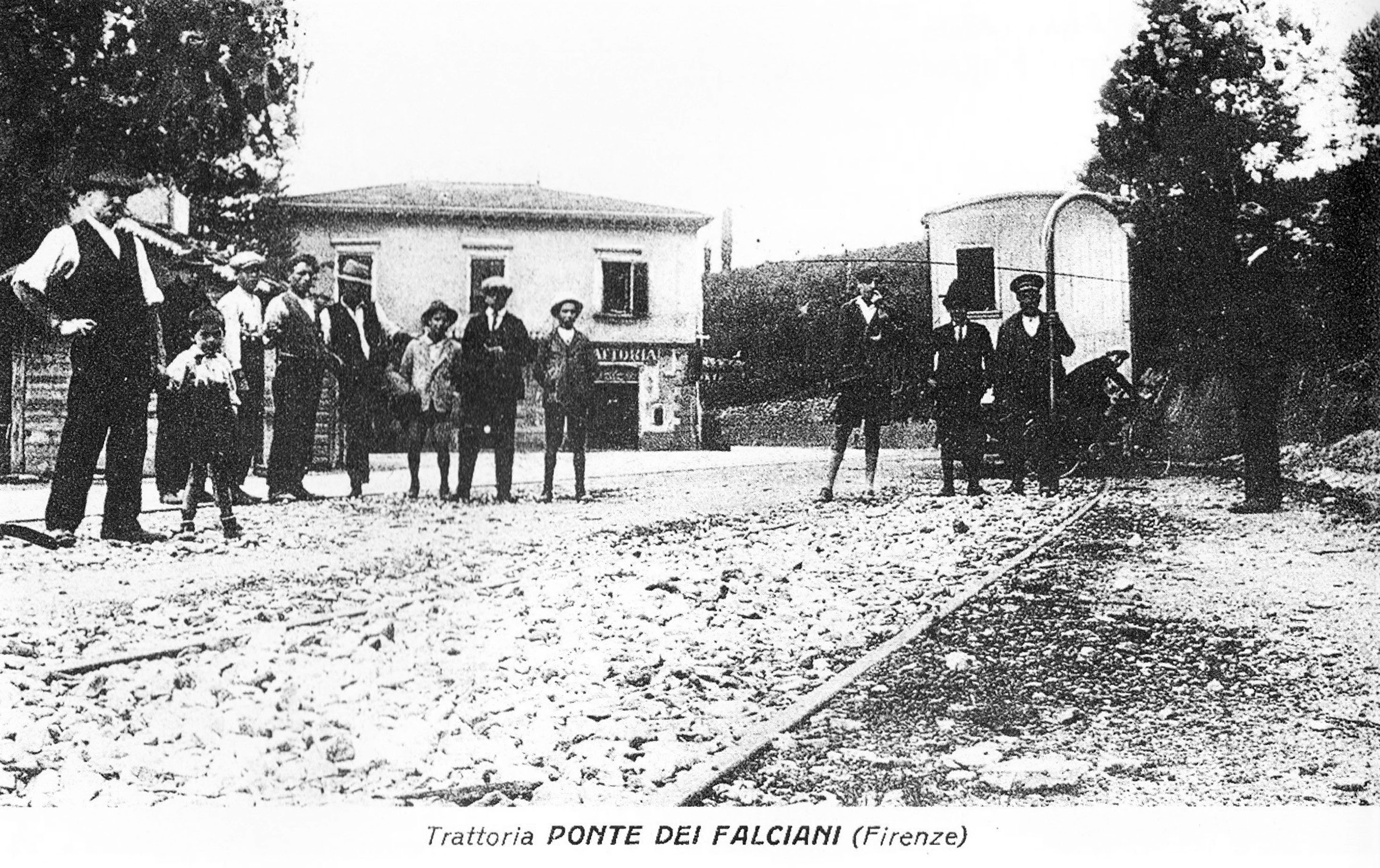 Veduta della stazione tranviaria dei Falciani